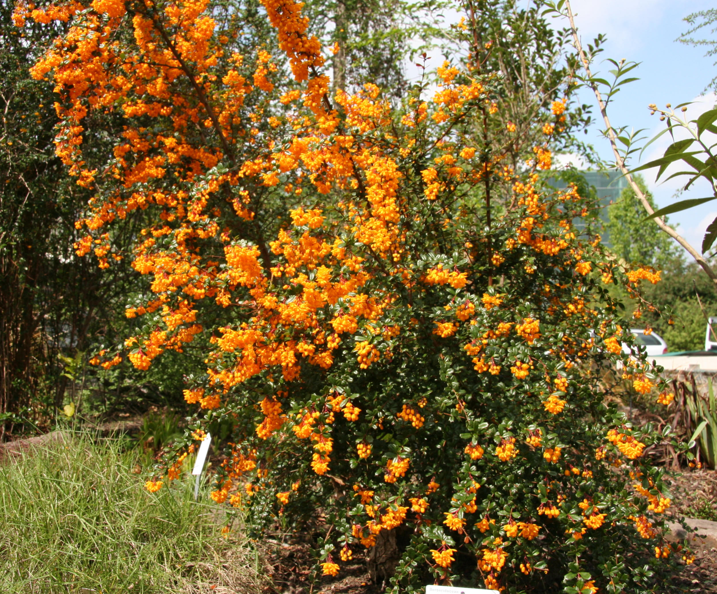 Berberis darwinii im Botanischen Garten Dresden